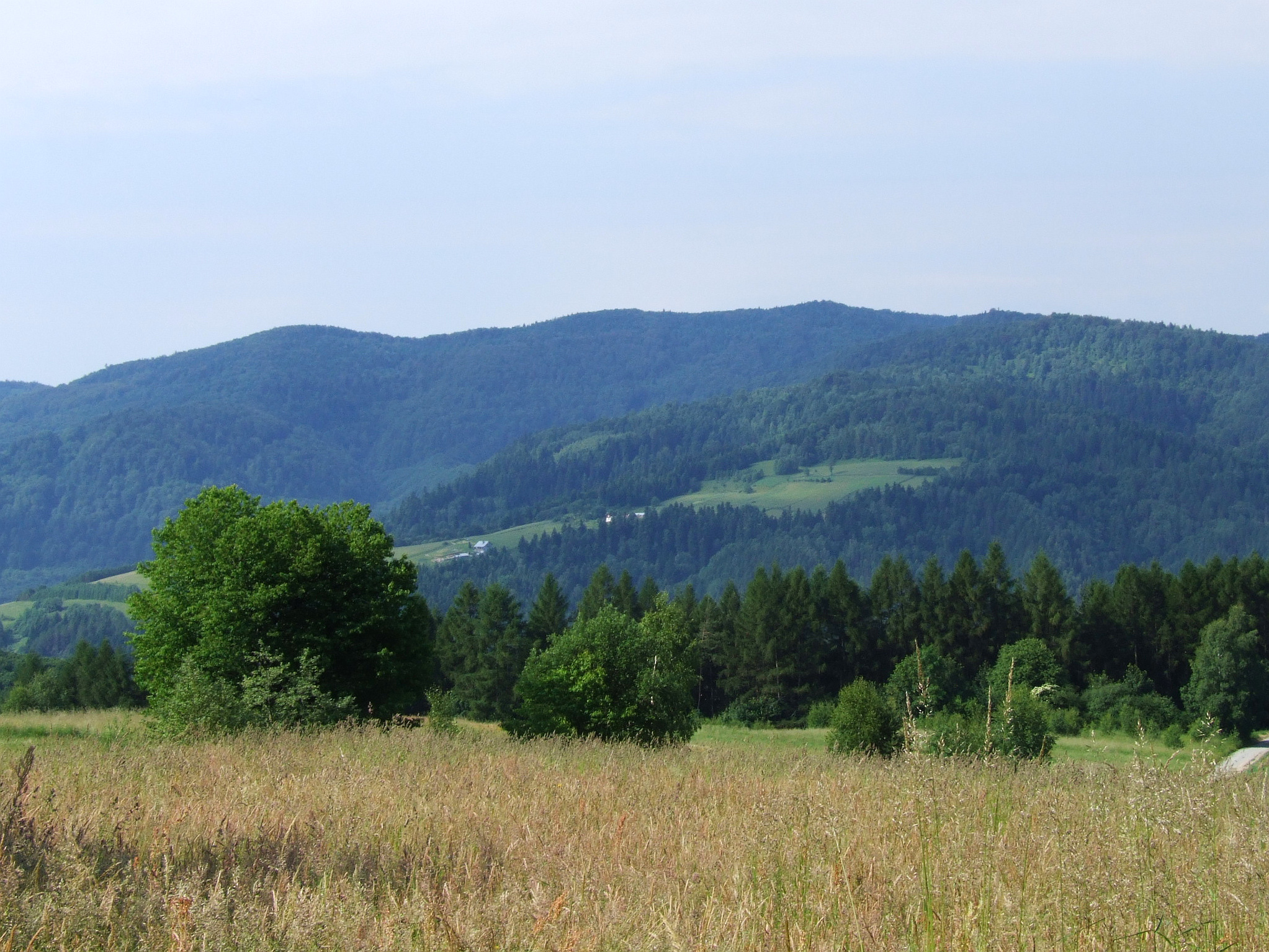 Masyw Magury Kurczyńskiej, Wielka Polana i dolina Popradu. Widok z Malnika nad Muszyną.